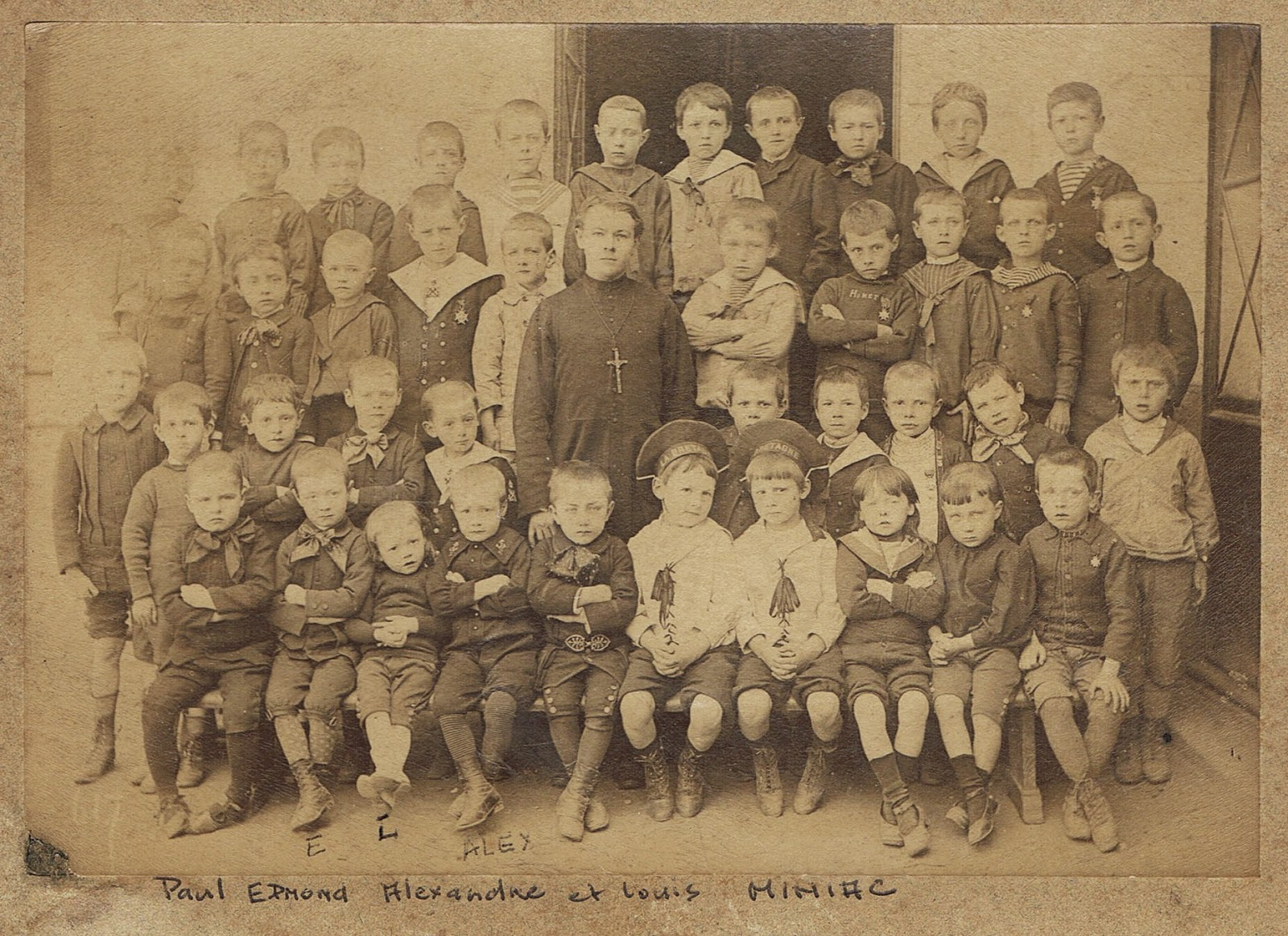 La fratrie Miniac à l'école des frères de Saint-Servan-sur-Mer, vers 1890-1895.